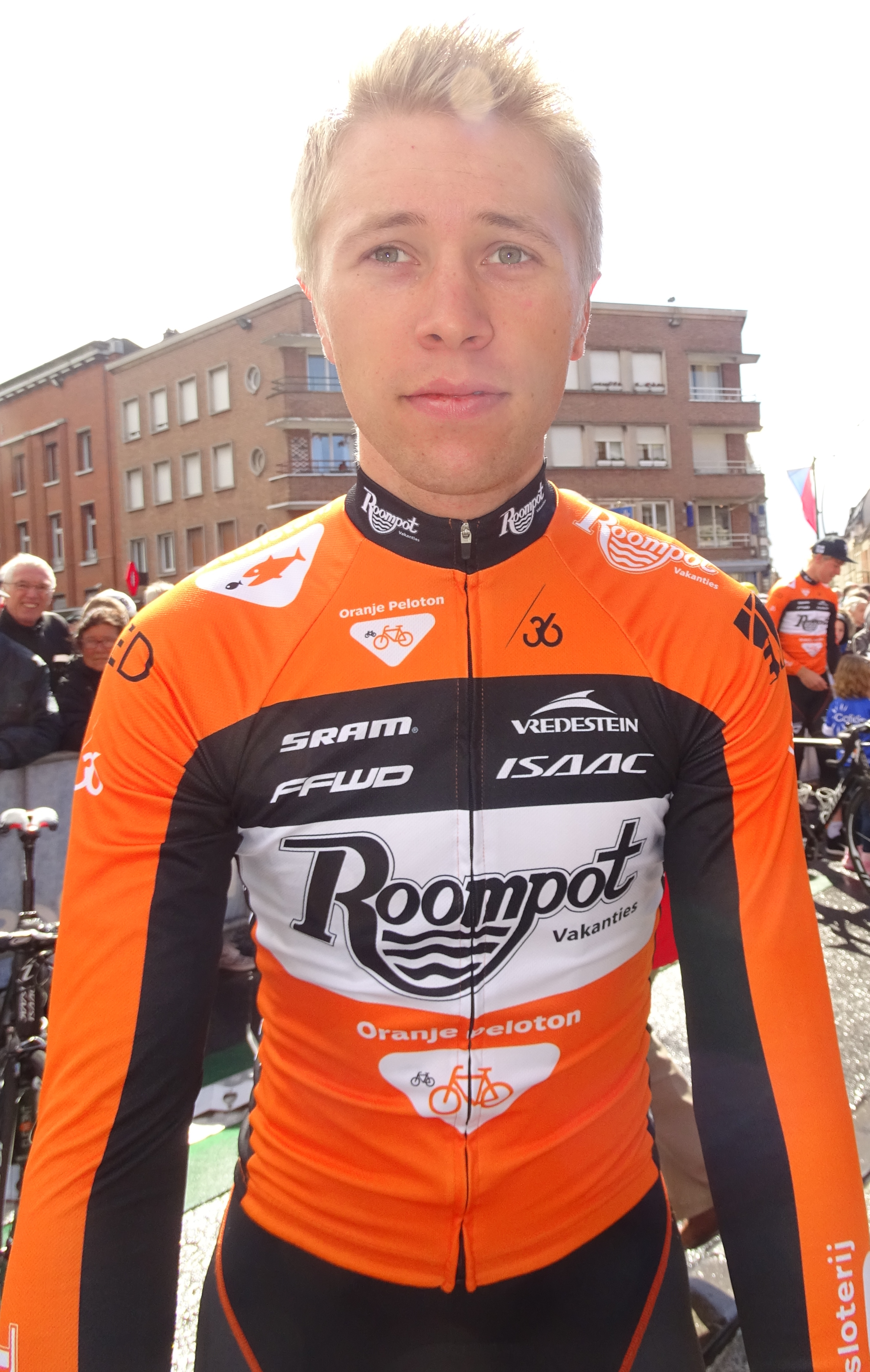 Reportage réalisé le mercredi 6 mai 2015 à l'occasion du départ de la première étape des Quatre jours de Dunkerque 2015 à Dunkerque, Nord, Nord-Pas-de-Calais, France. Depicted person: Maurits Lammertink Depicted team: Roompot